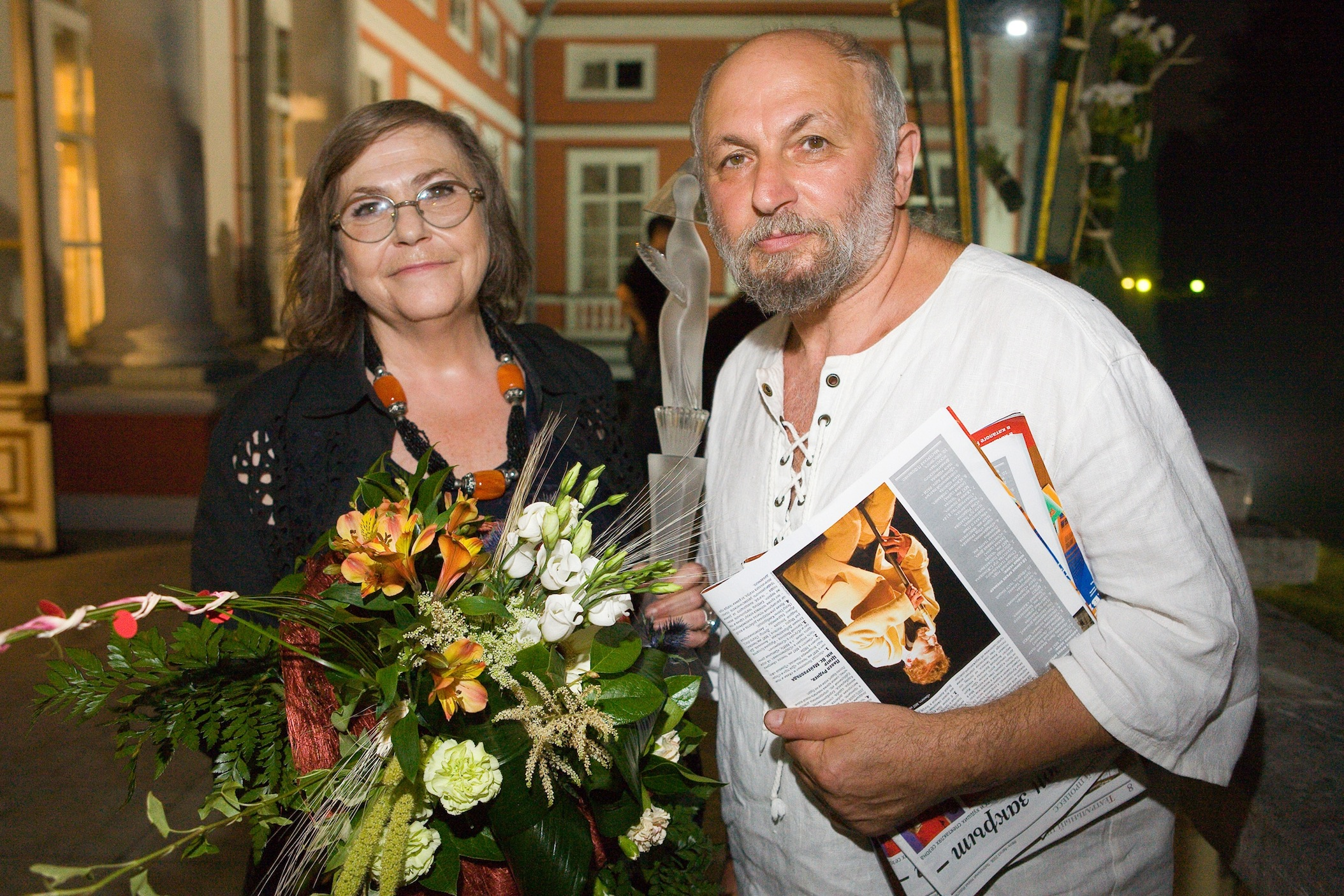 Генриетта Яновская и Кама Гинкас на вручении премии "Хрустальная турандот"